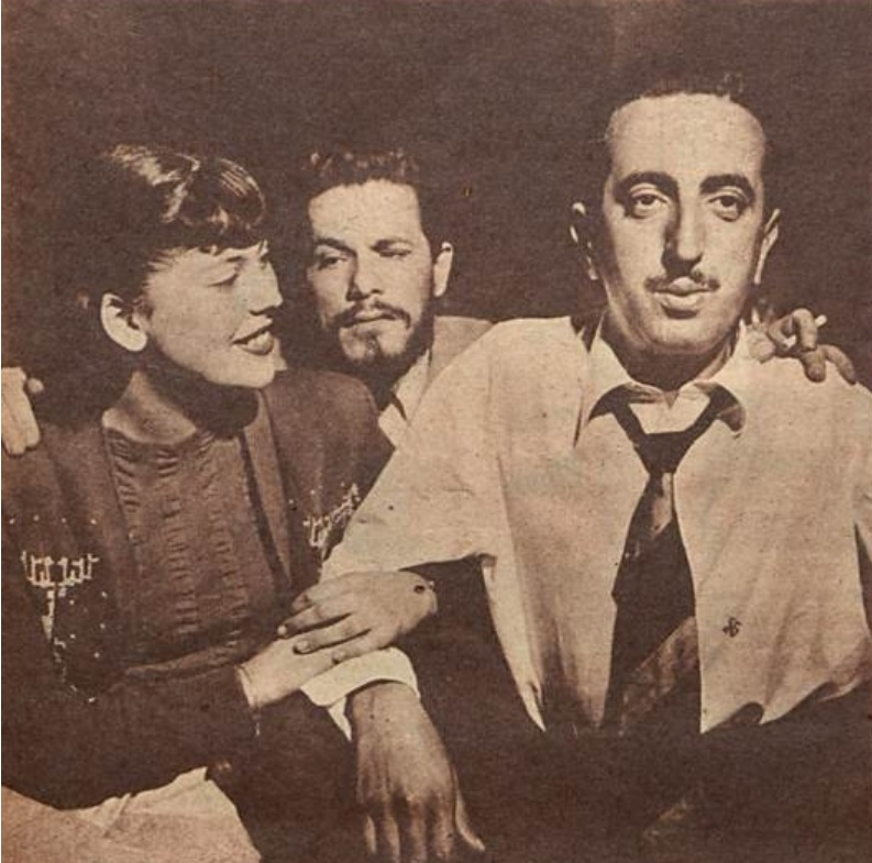 Os artistas Vida Alves, Dionísio de Azevedo e Homero Silva no set de filmagem de "Quase no Céu", de Oduvaldo Vianna.